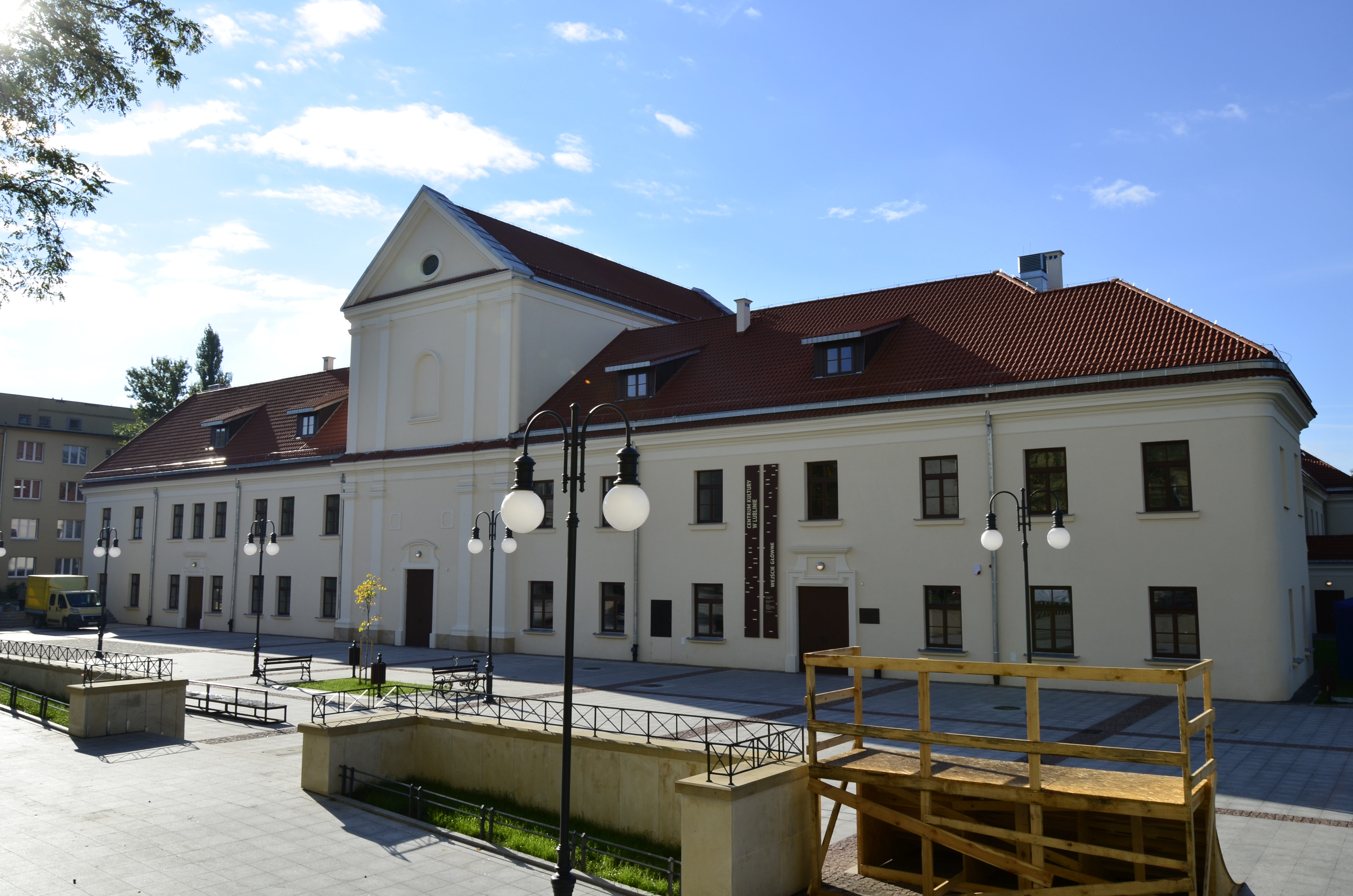 Lublin, zespół klasztorny wizytek, 1731-1749, po 1810 605952